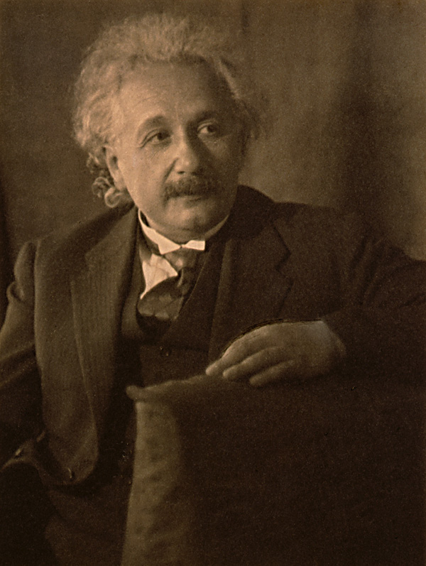 Albert Einstein fotografert av Doris Ulmann (1882-1934). Kopinegativ frå Kongressbiblioteket i USA.